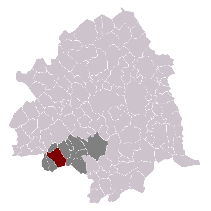 Annoeulin dans son canton et son arrondissement